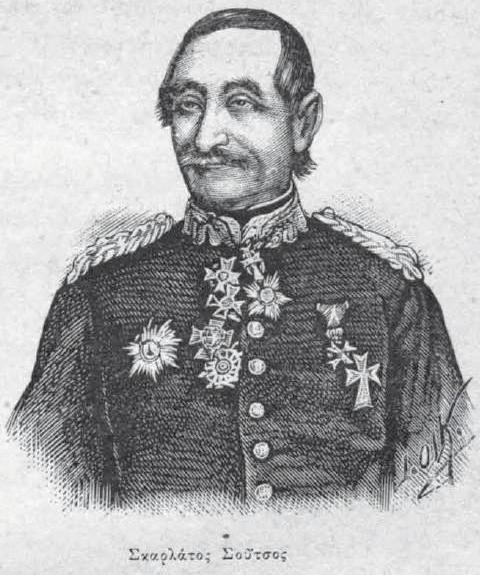 namhafte Griechische Persönlichkeit, 19. Jahrhundert